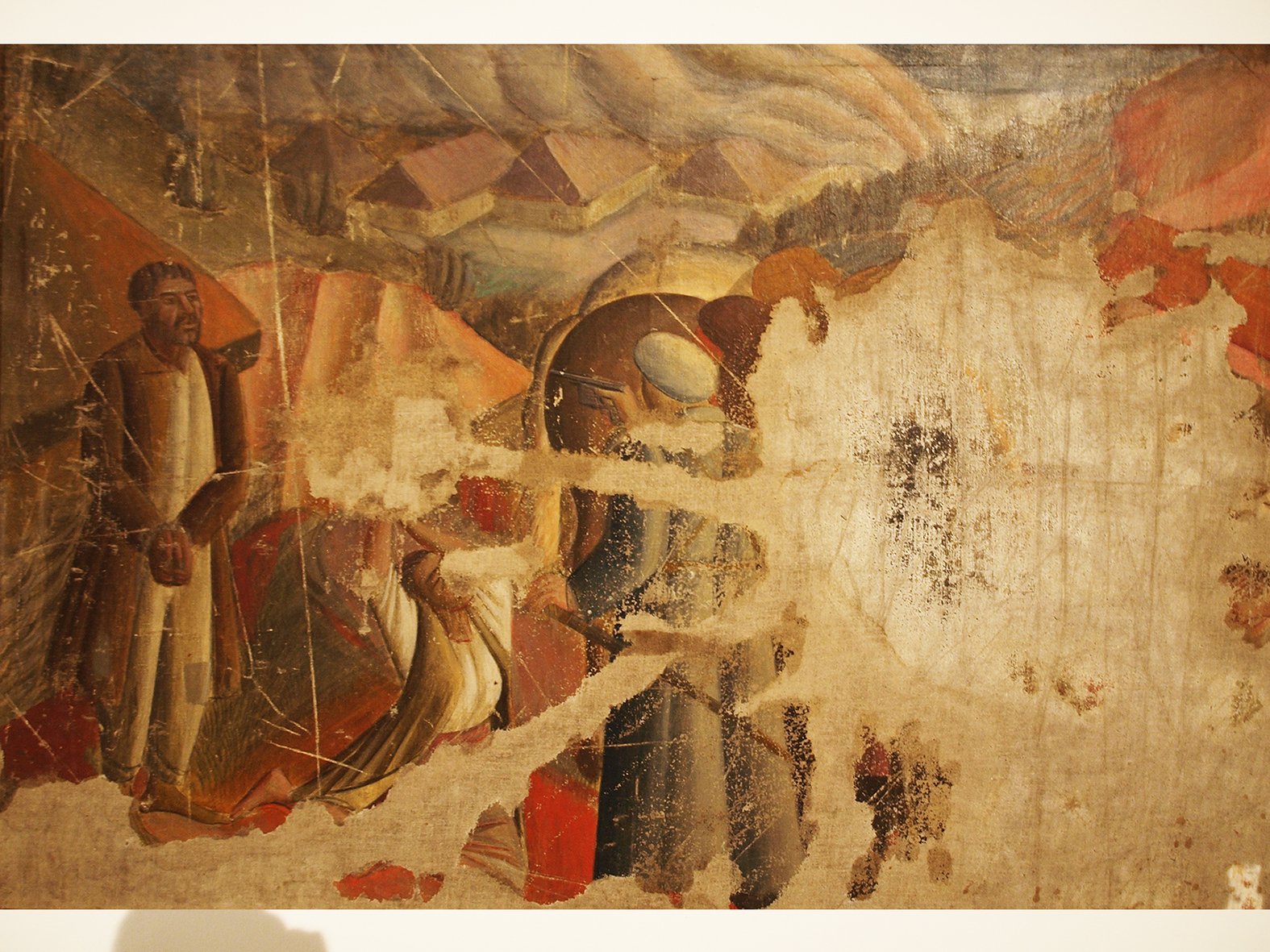 Напівзнищена картина Василя Седляра «Розстріл в Межигір’ї». Полотно, темпера. 1927.Запасник Національного художнього музею України.